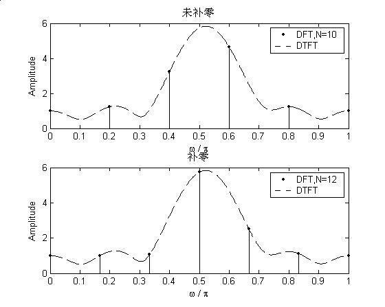 自绘。DTFT与DFT的关系。